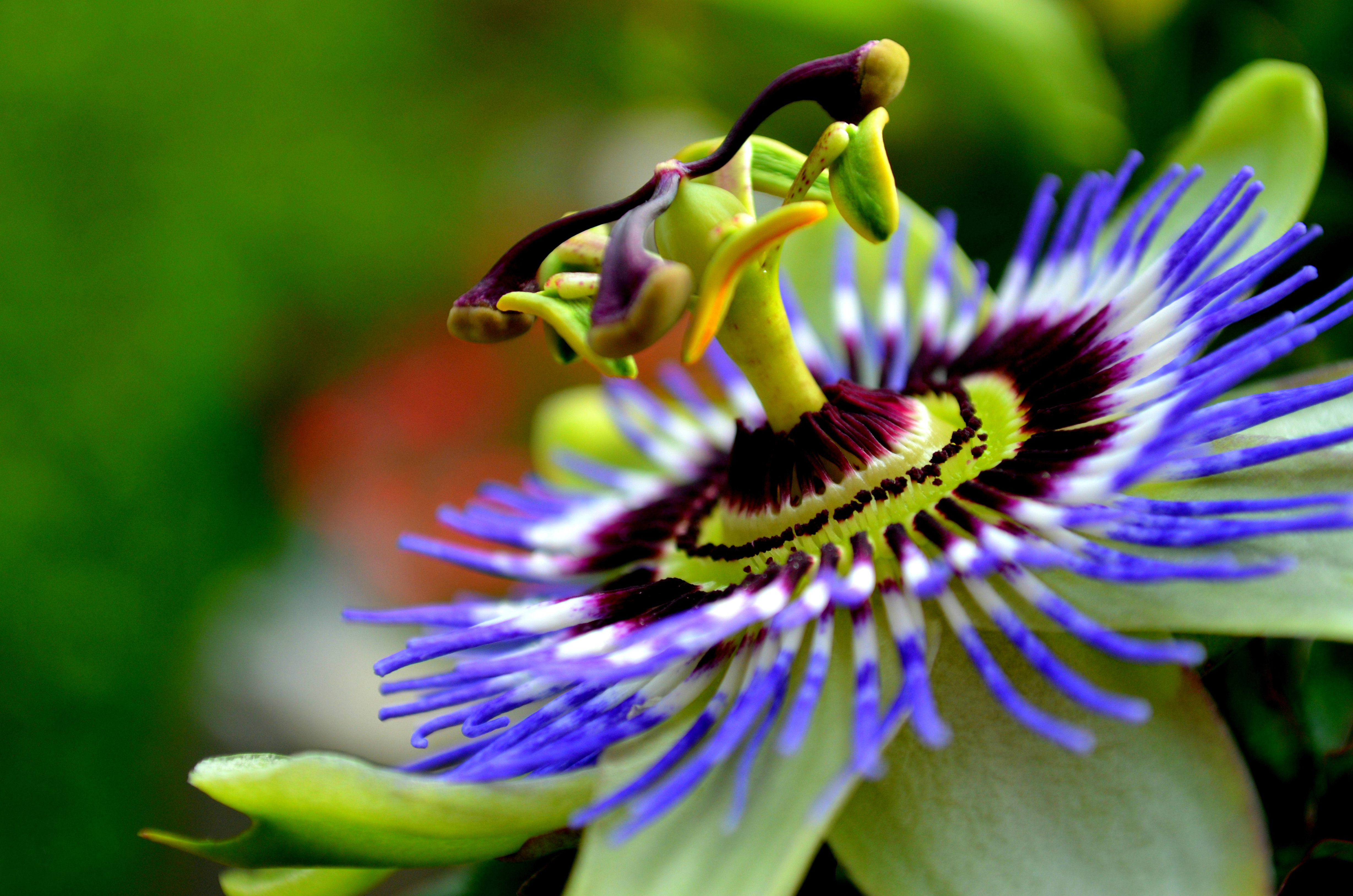 Blume eines Gasthofes in Südtirol.